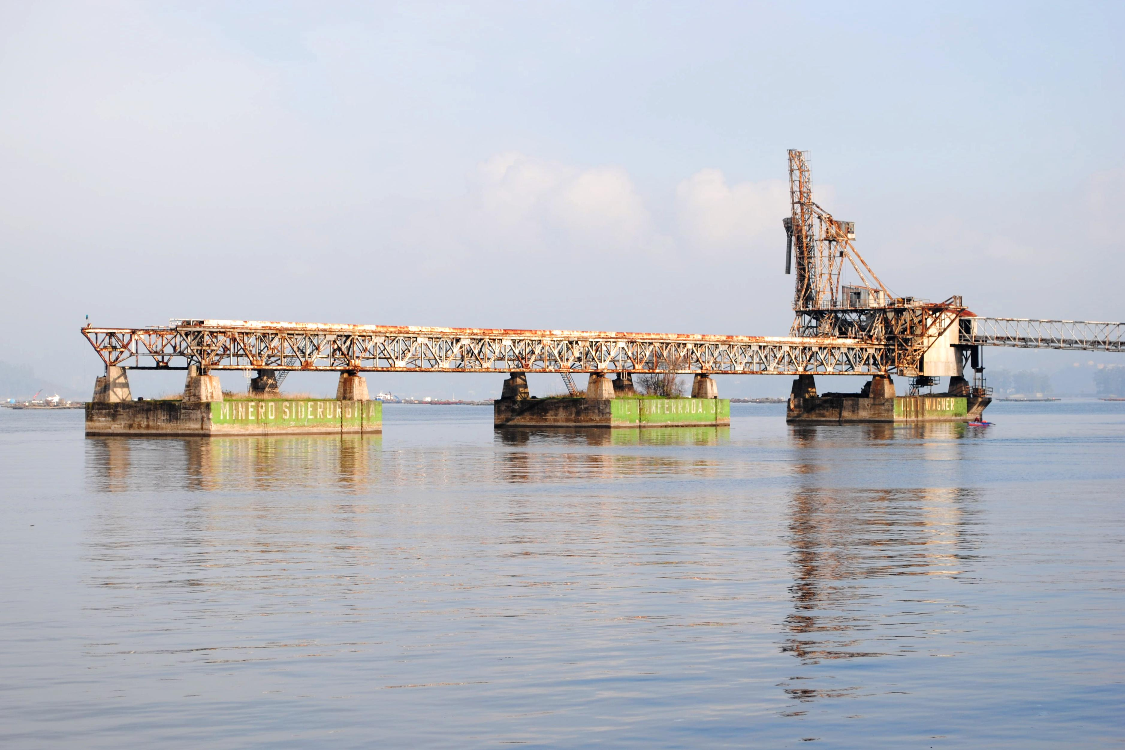 Vexa o título e as categorías